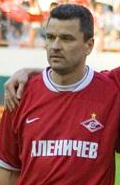 Yuri Nikiforov, Russian footballer.